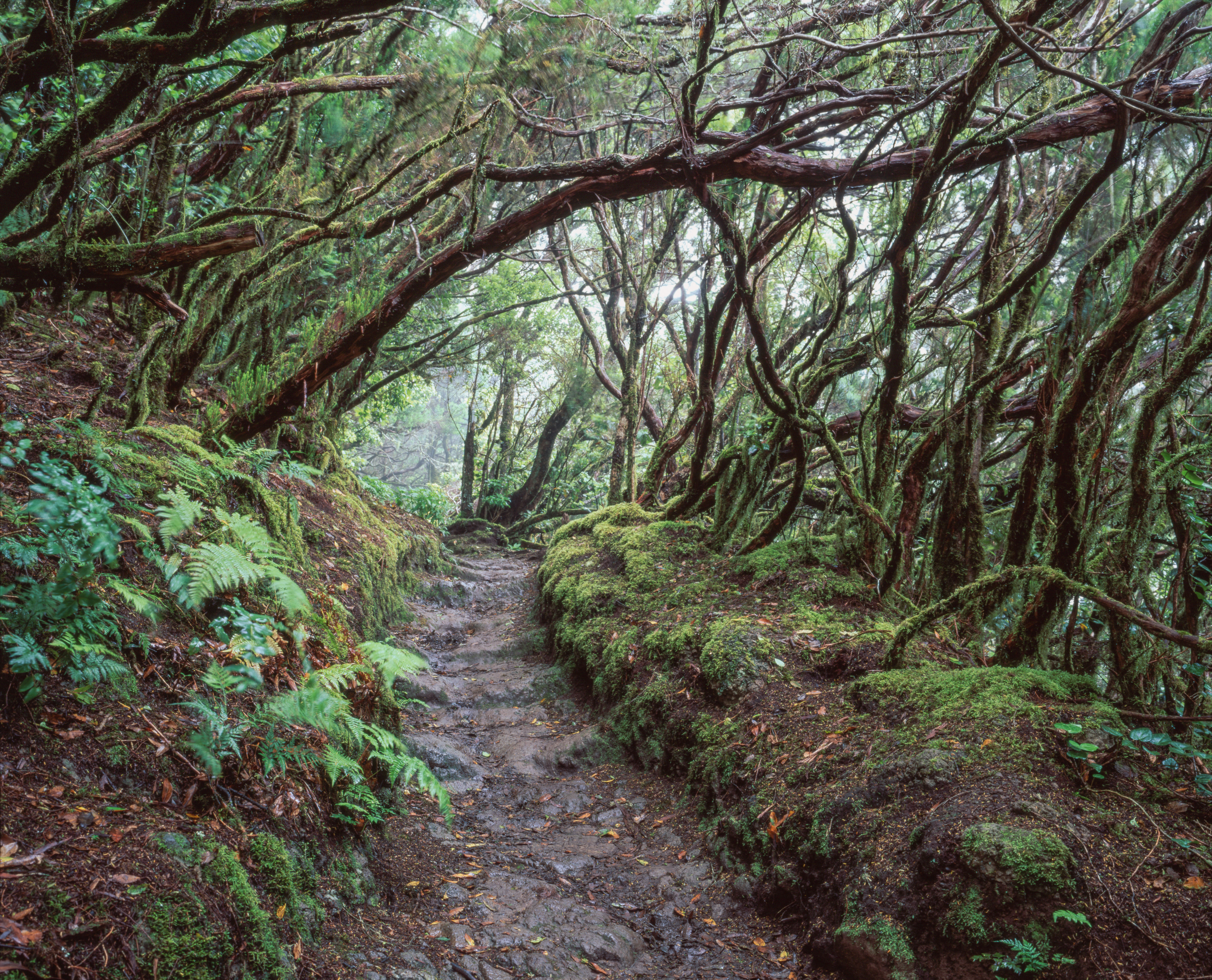 Mamiya 7 II Fuji Velvia 50